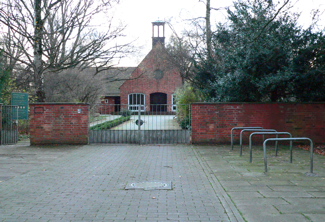 Kirchröder Friedhof (Hannover)